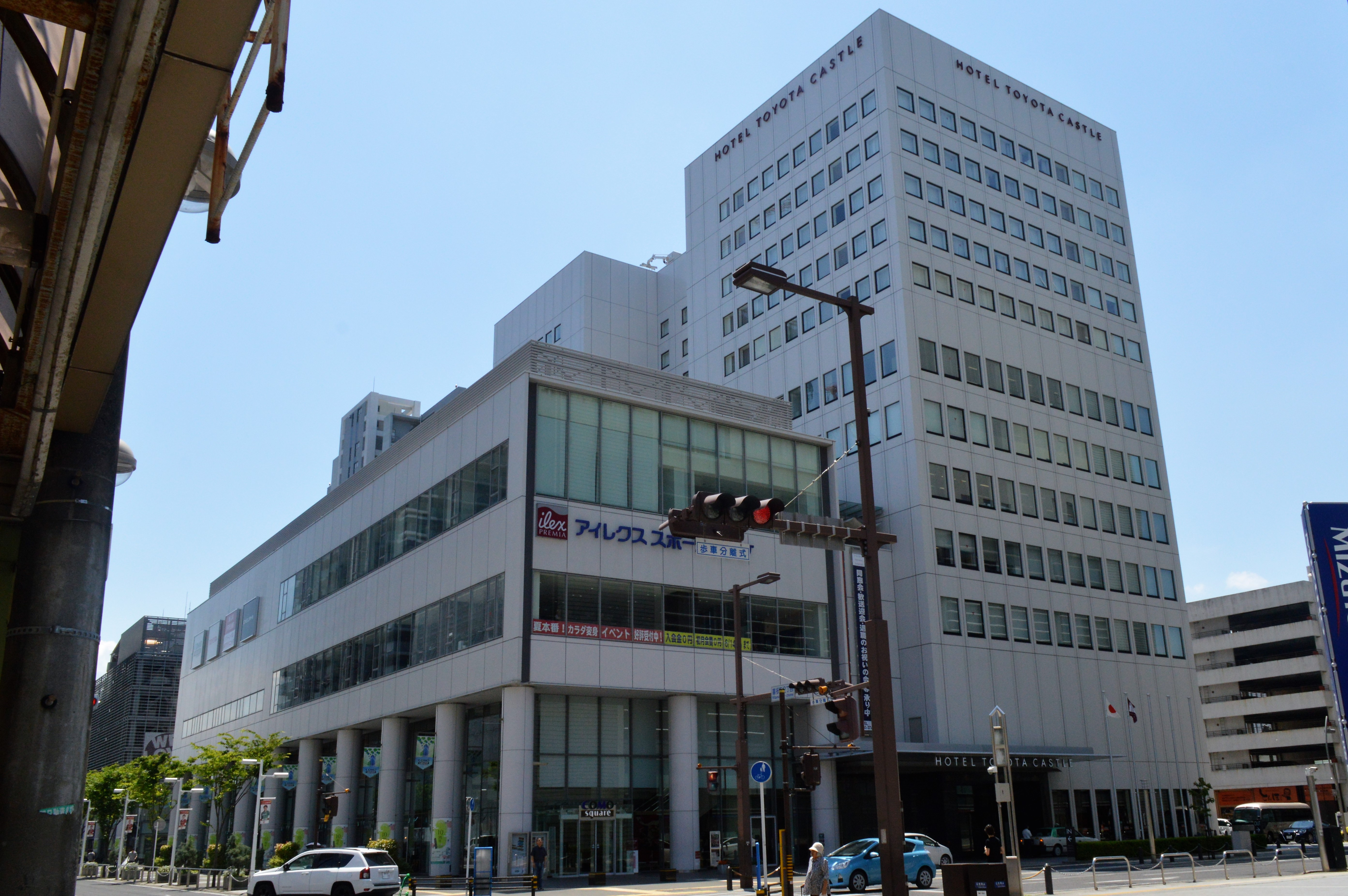 愛知県豊田市にある商業施設「コモ・スクエア ウェスト」。